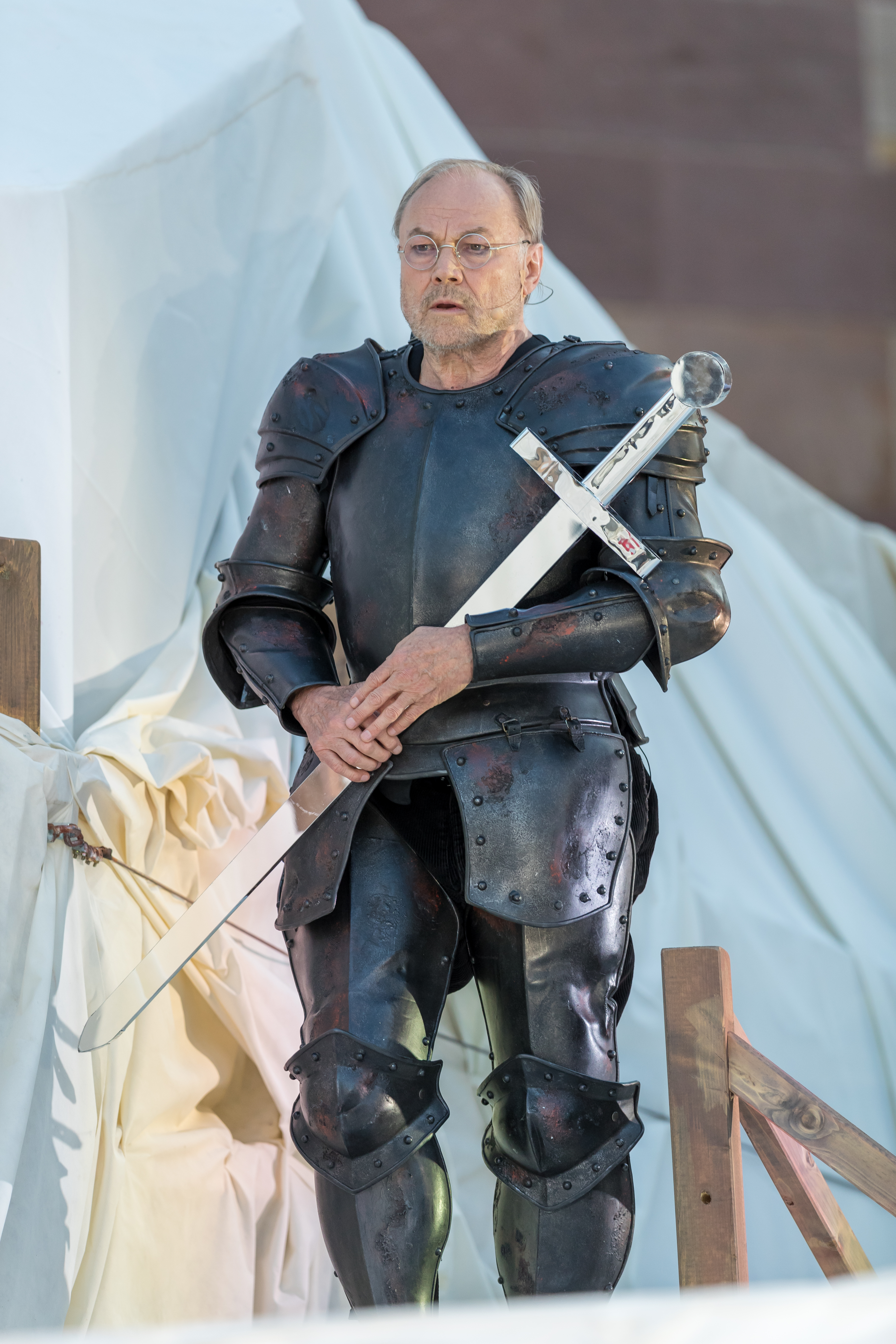 Klaus Maria Brandauer during Nibelungenfestspiele ( at Worms, Rheinland-Pfalz, Germany on 2019-07-10, Photo: Sven Mandel